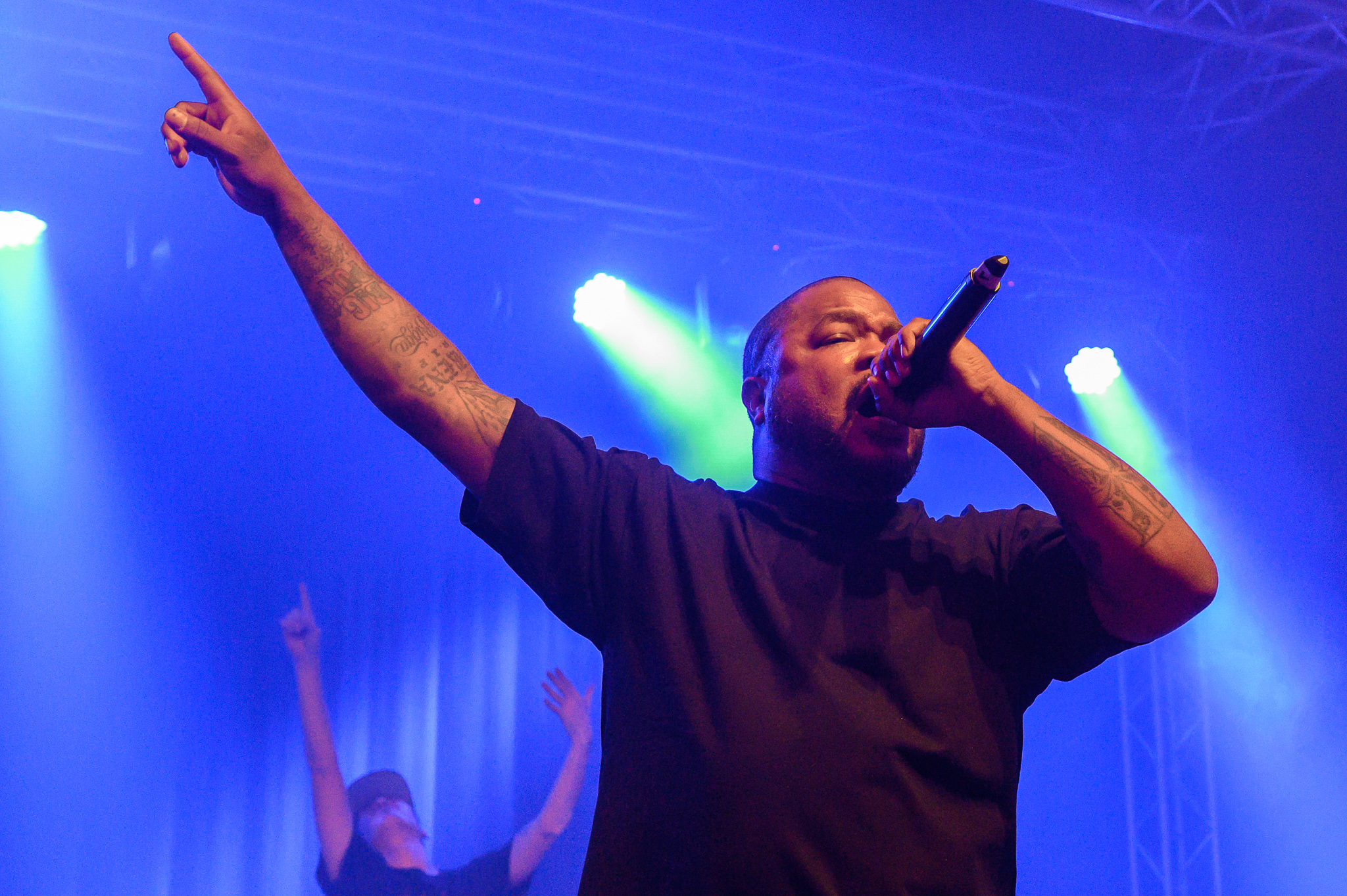 Concertbüro Franken,Livekonzert,Livemusik,Löwensaal,Xzibit